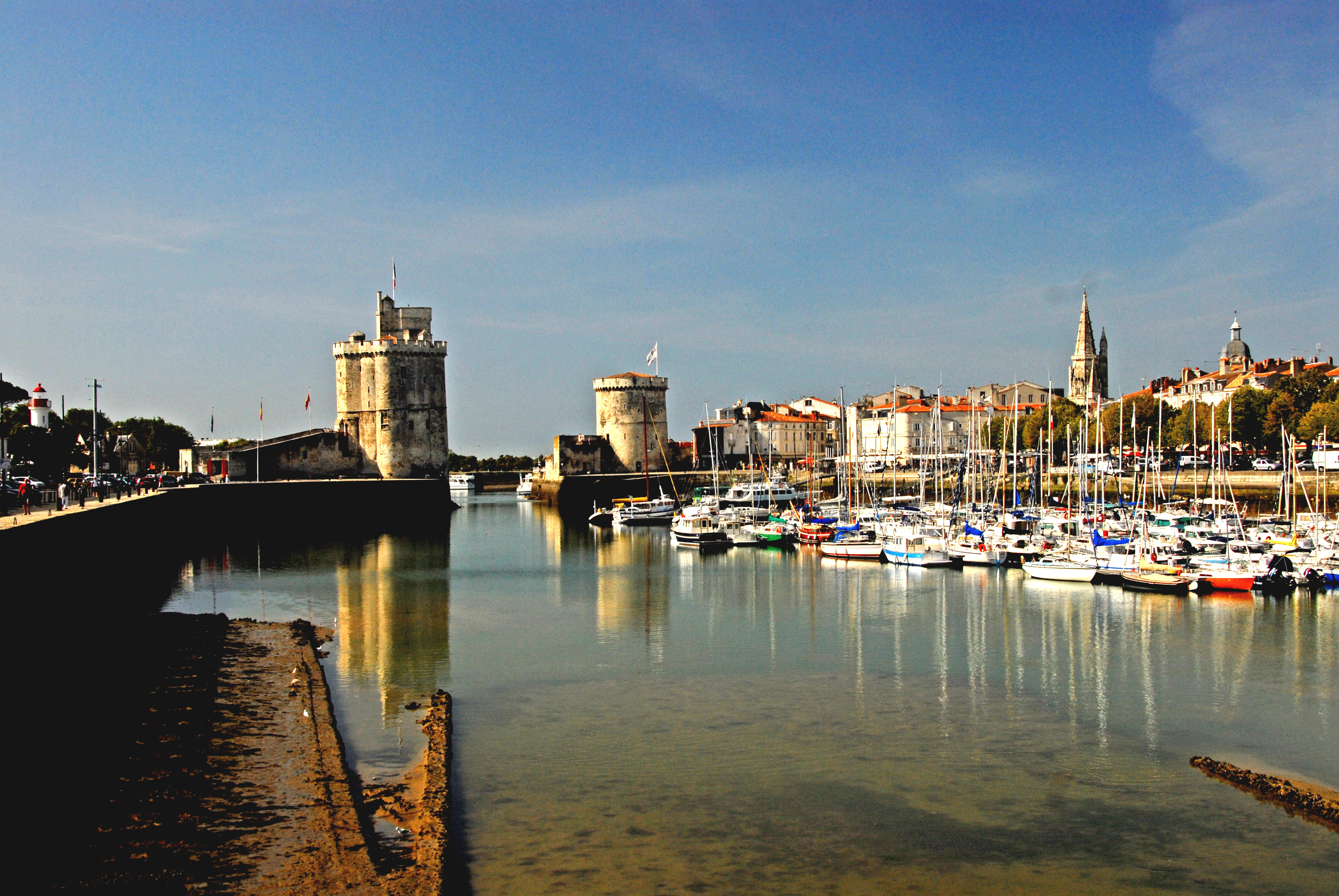 La Rochelle, Vieux Port, Richtung Ausfahrt